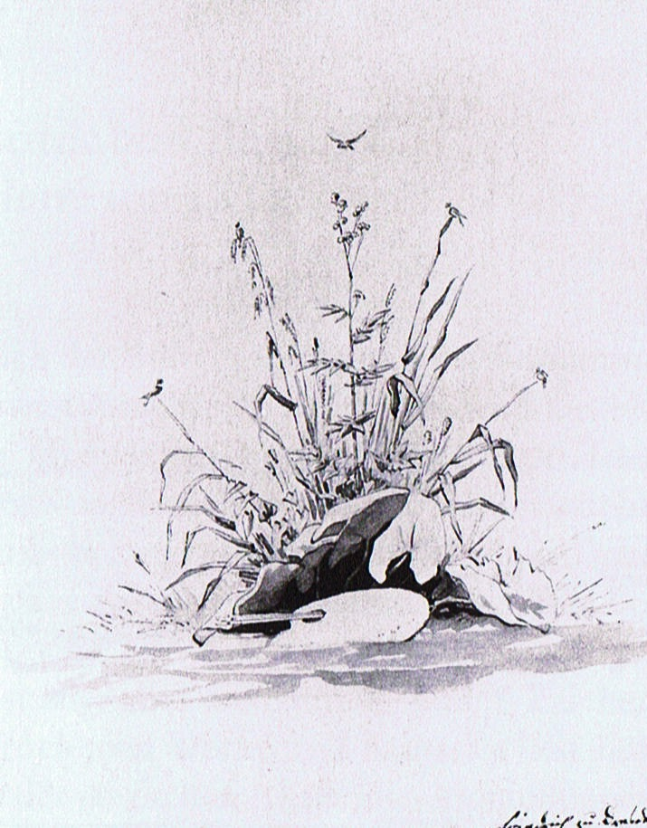 Caspar David Friedrich: Gräser und Palette. Um 1838, Feder, laviert, 20,2 x 15,4 cm